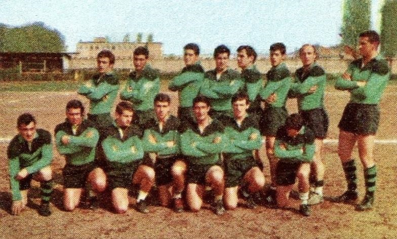 L'Aquila rugby en 1966-1967 - Campioni dello Sport 1967-1968, n°490